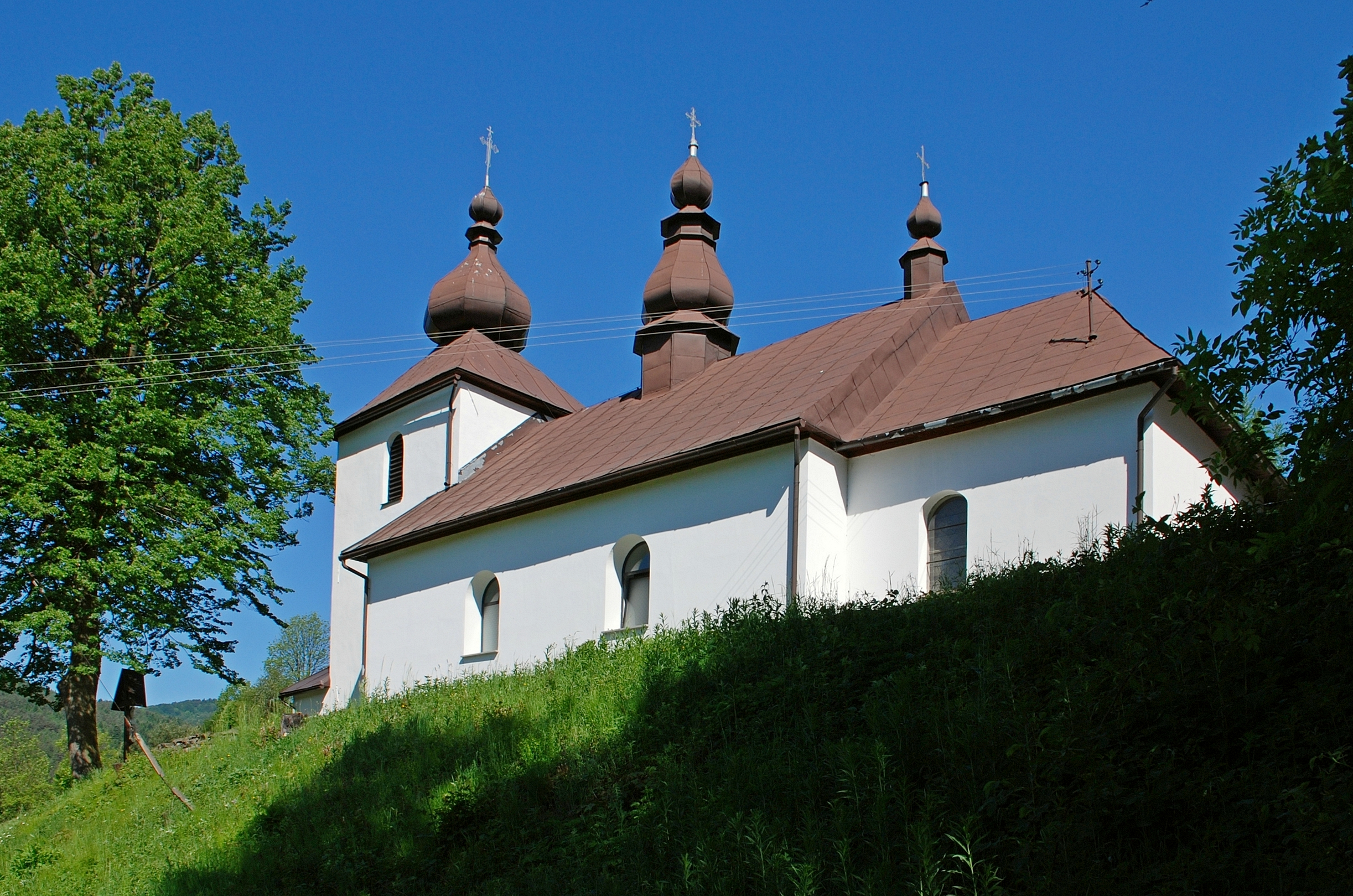 wieś Zubrzyk